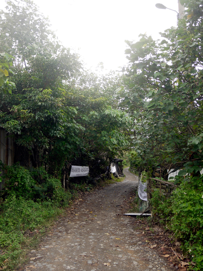 阿塱壹古道 旭海段